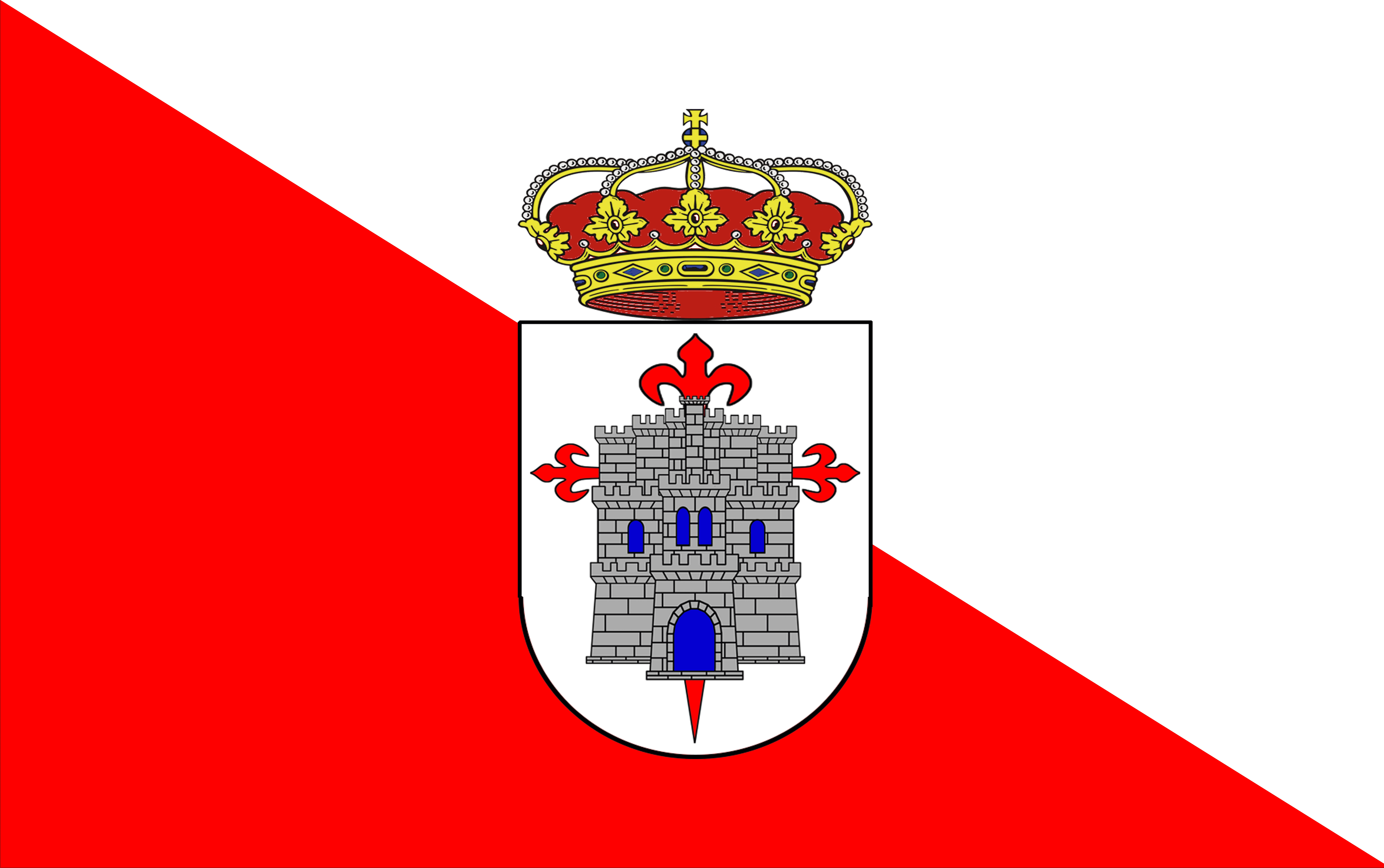 Bandera de Azuaga